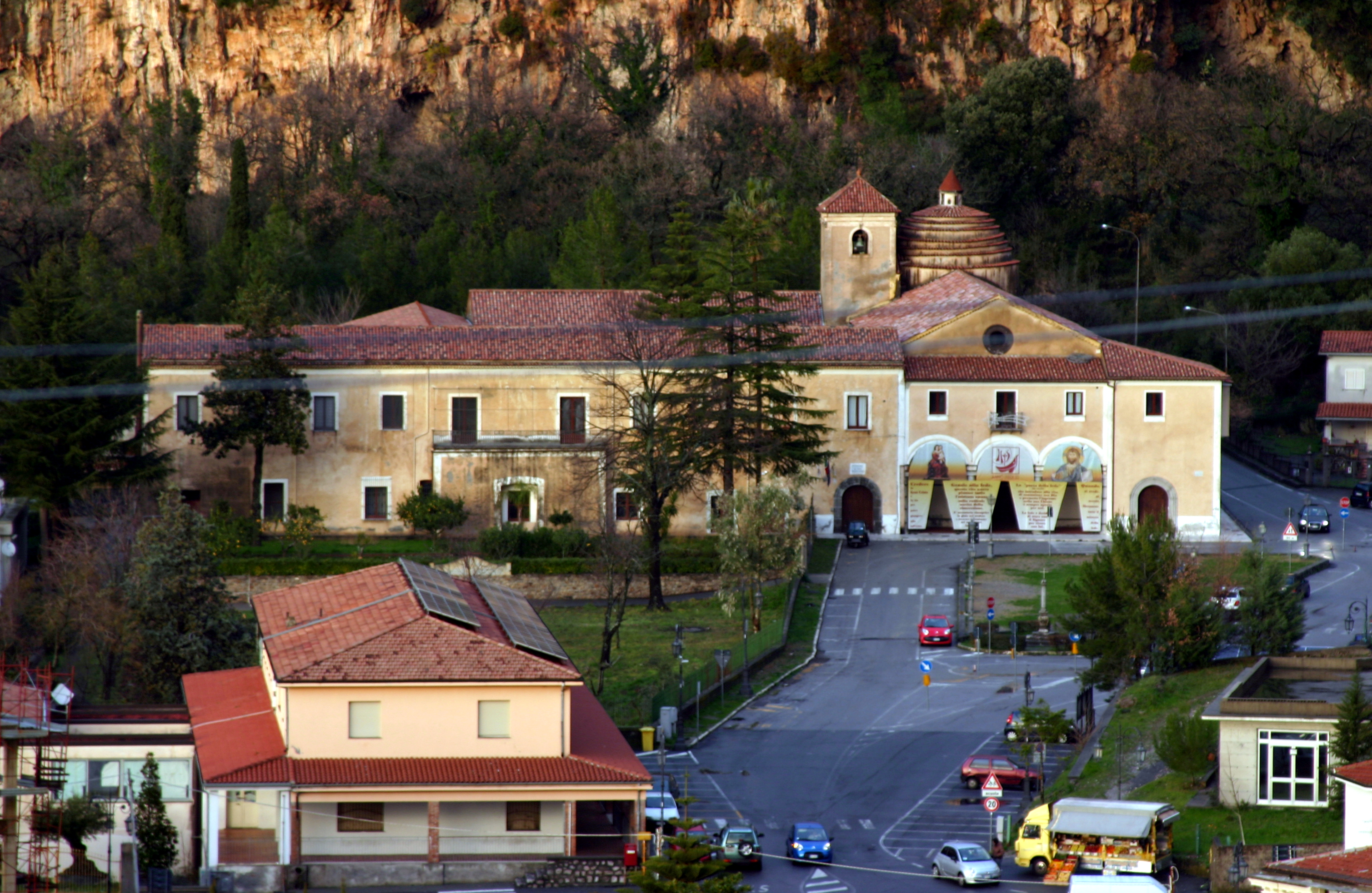 Maratea